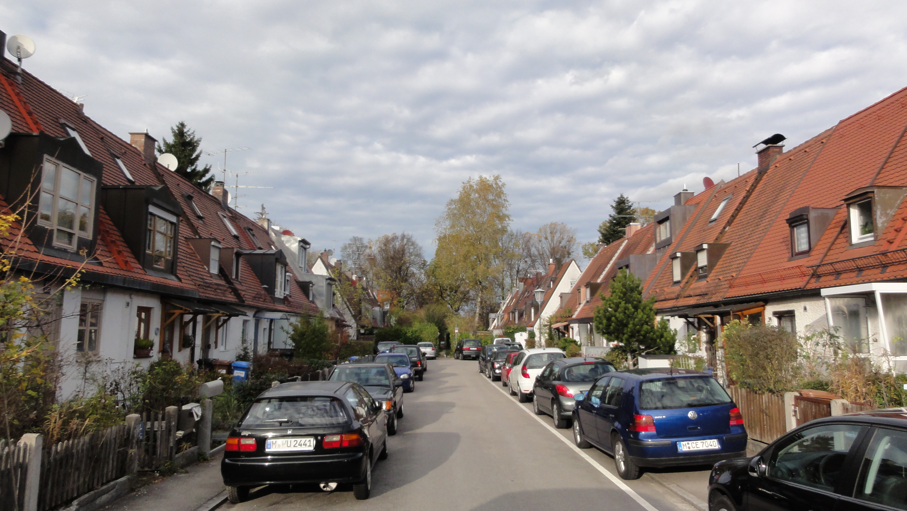 Munich - Heilbrunner Str. nördlich